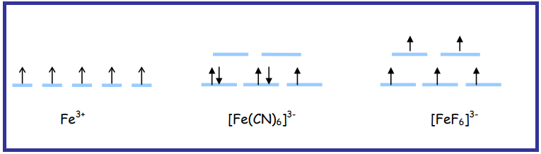 Fe-ren kasua